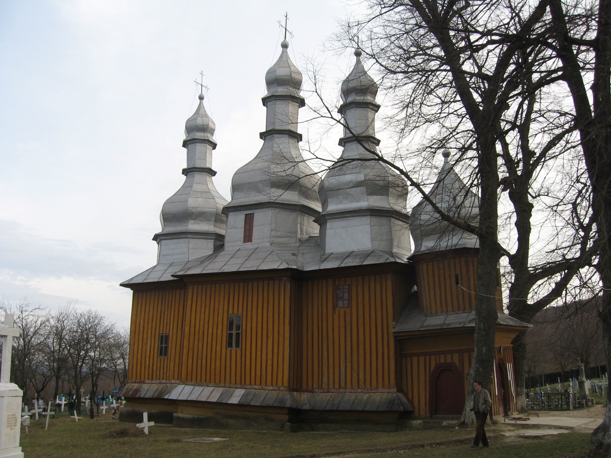 Mănăstirea Brădiceşti